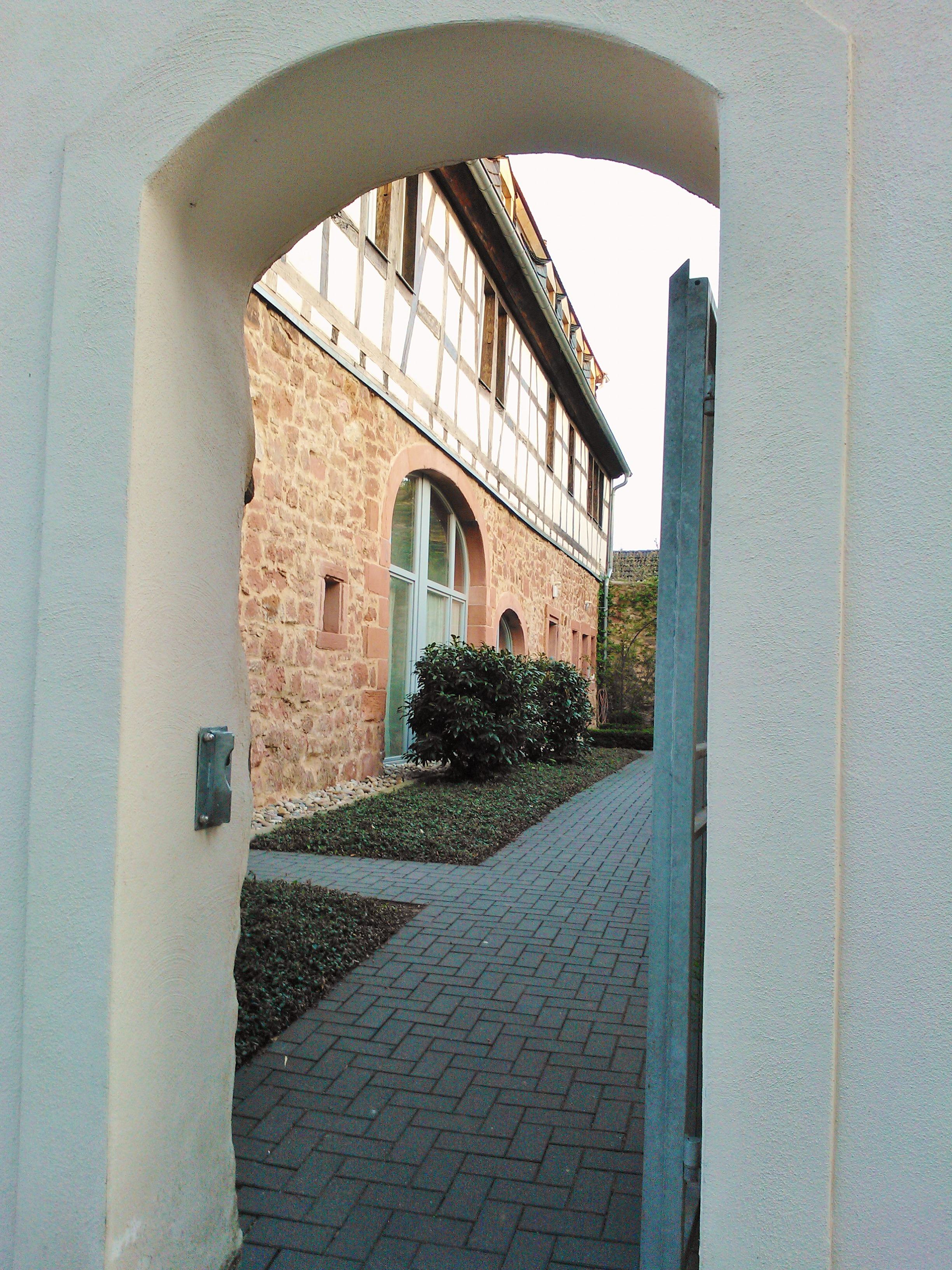 Blick durch den neuzeitlichen Eingang auf die heute zum Wohnhaus umgebaute alte Scheune des ehemaligen Gans'schen Adelshofes